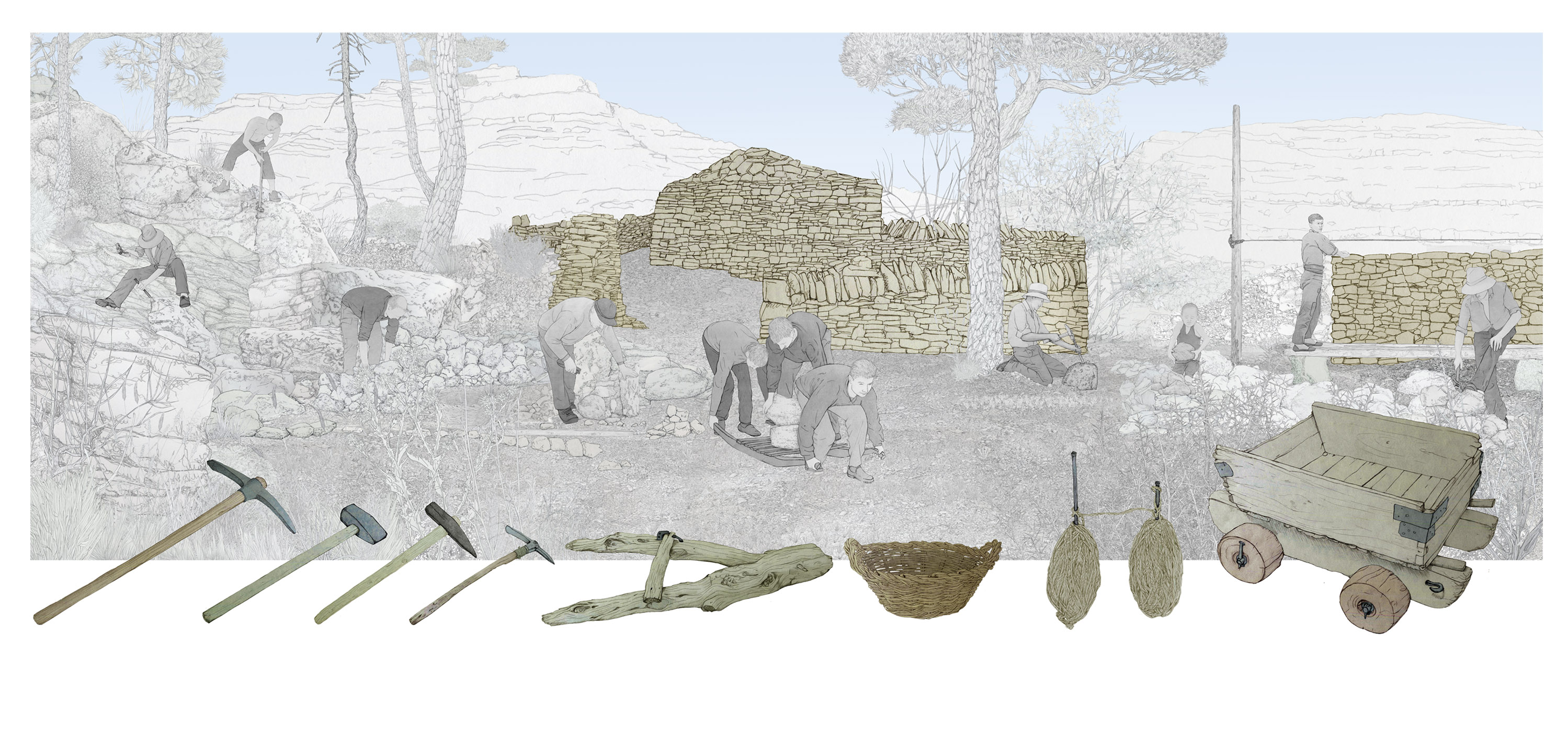 Il·lustracions d'Andrés Marín Jarque per a l'exposició permanent "Secà i Muntanya" del Museu Valencià d'Etnologia. S'il·lustren els escenaris del medi rural i el procés (treball) mitjançant el qual s'aprofita este espai.